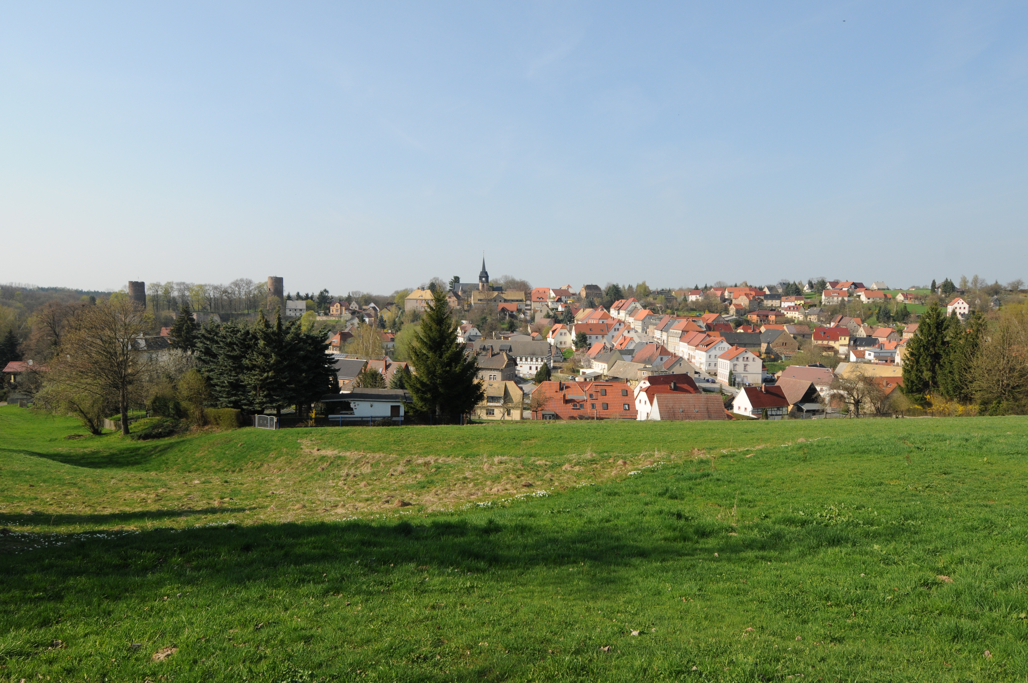 Kohren-Sahlis, Gesamtansicht (Sachsen, Deutschland)